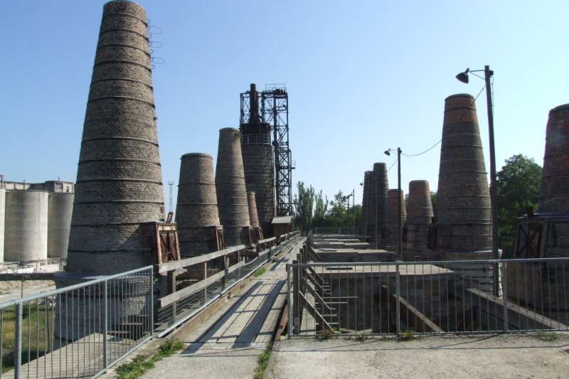 Museumsbark Rüdersdorf: Schachtofenbatterie Fotograf: Harald Rossa Datum: 3. Oktober 2006 Höher aufgelöste Version ist verfügbar